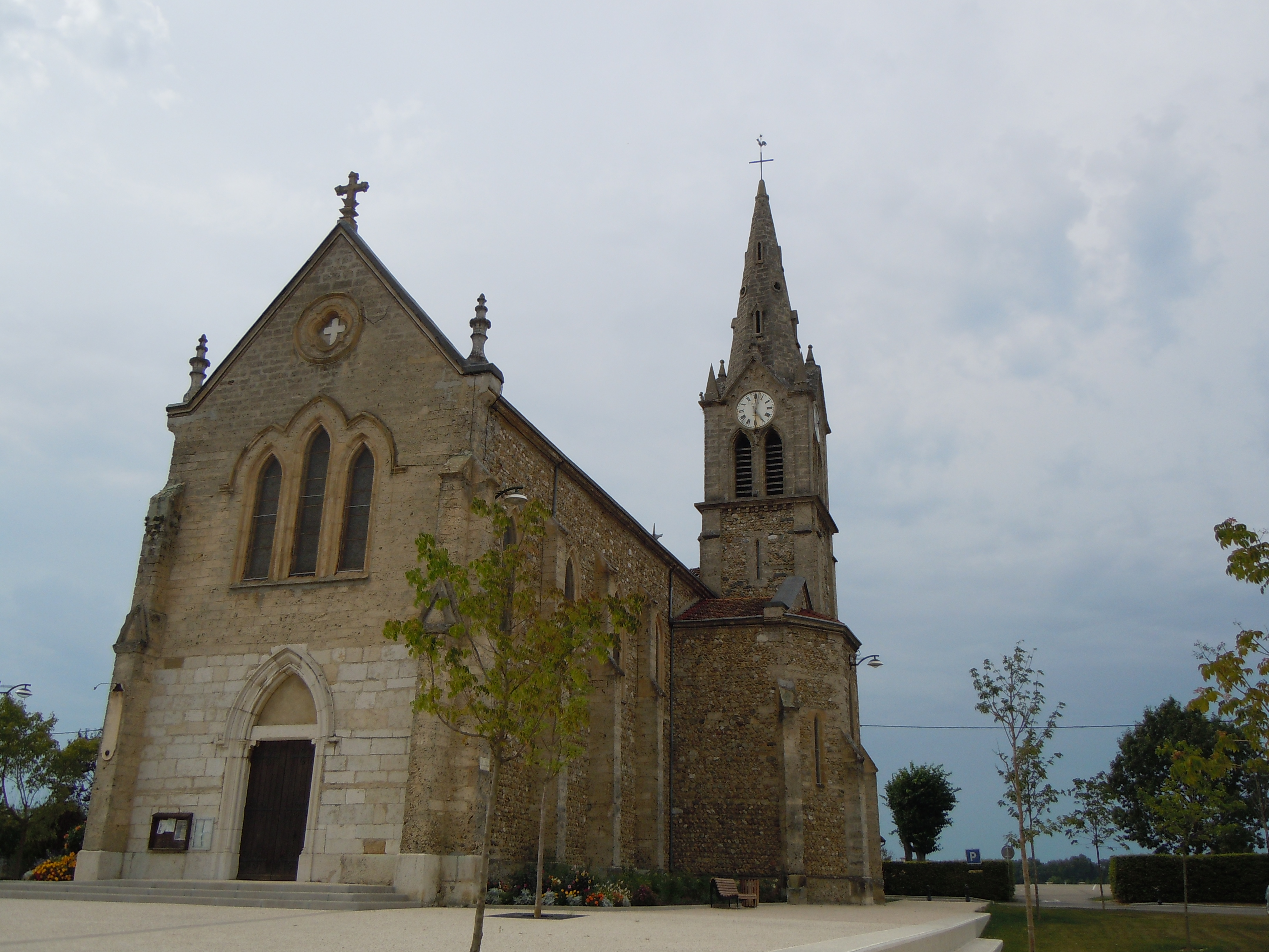 Eglise de Montferrat (Isère)